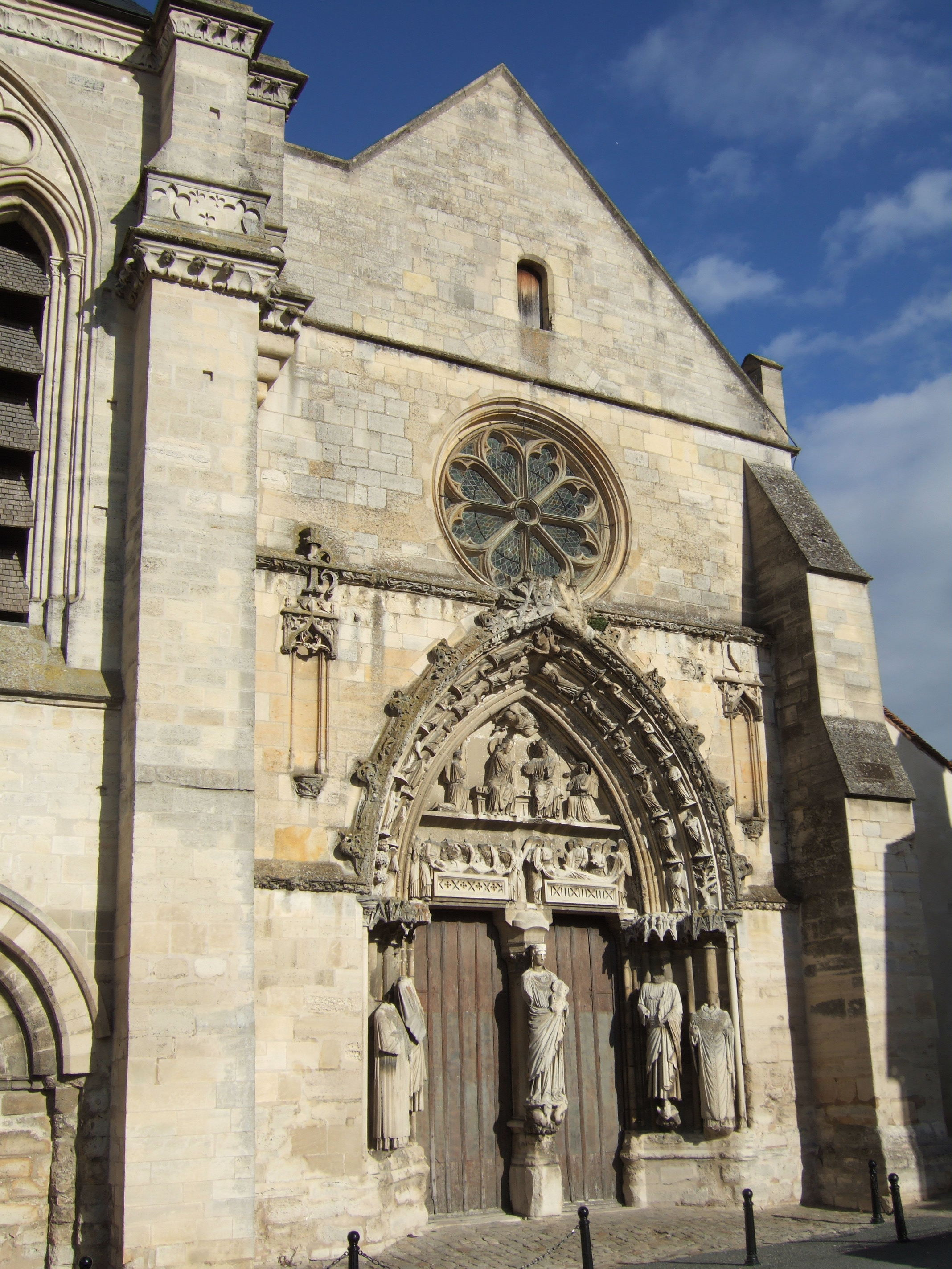 Vue du portail de la basilique de Longpont-sur-Orge. Photographie prise par Yves Fraysse le 4 septembre 2006